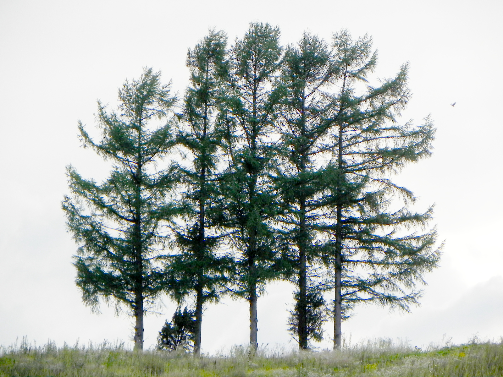 5本の木（モラルの木かも・・・）